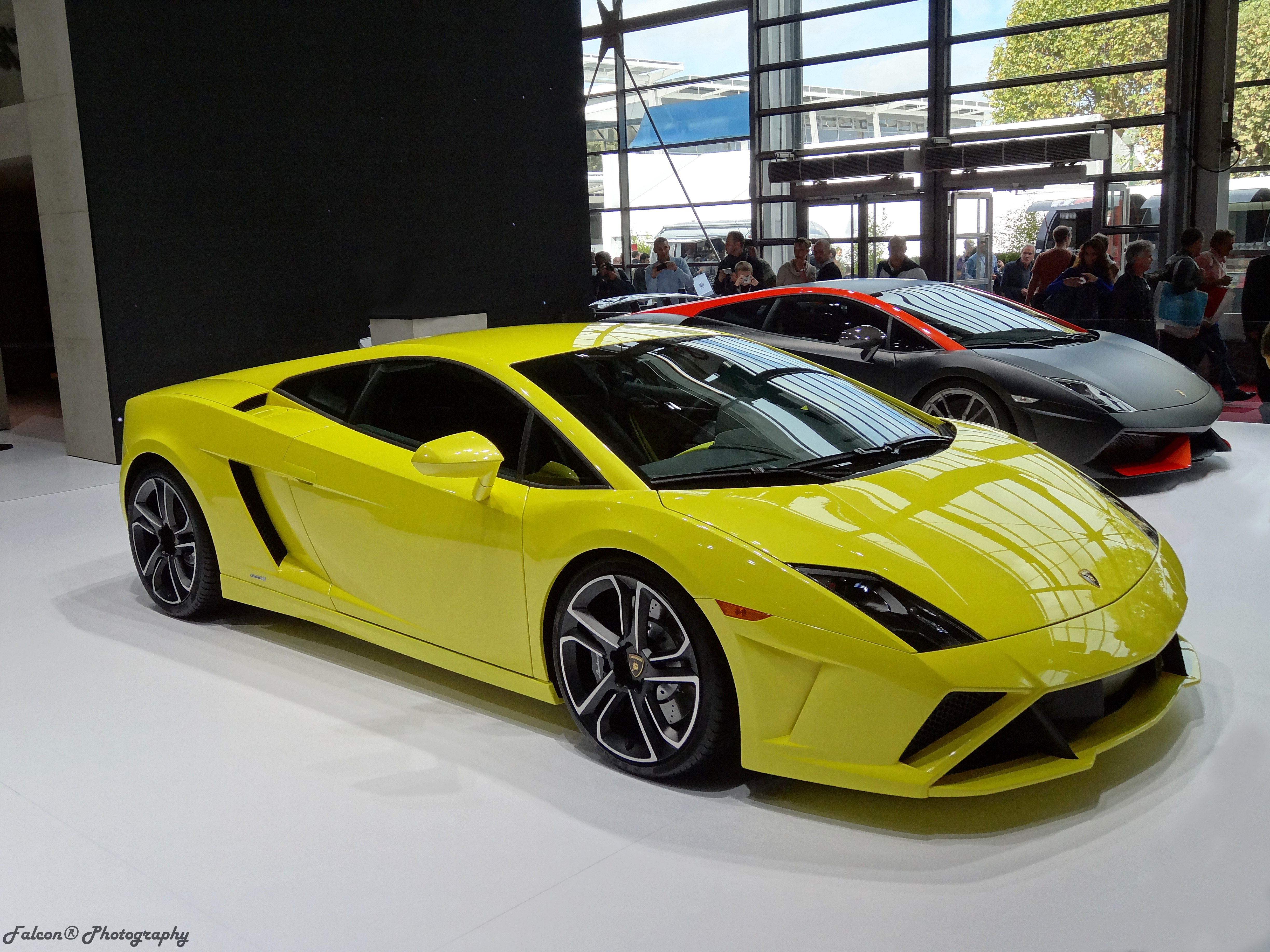 LP560-4 560 HP (412 kW) @ 8,000 RPM 540 Nm (397 lbft) @ 6,500 RPM 325 km/h (202 mph) 0-100 km/h (0-62 mph):3.7 s 1,410 kg